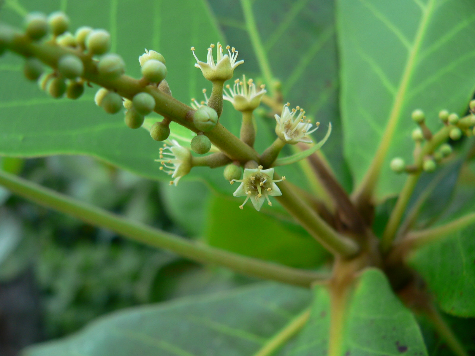 Terminalia catappa, épis floral, Guadeloupe